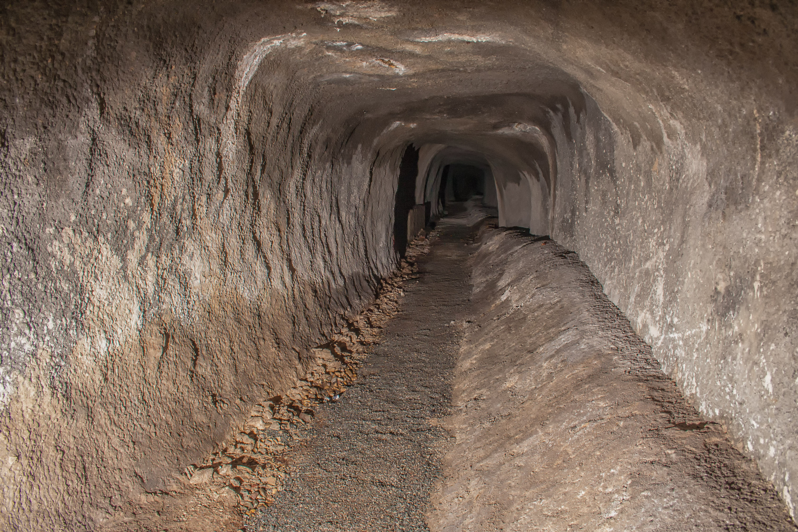 Tucherkeller, Nürnberg, ehemaliger Bierkeller, ehemaliger Bunker, Tucherstollen in Richtung Paniersbunker